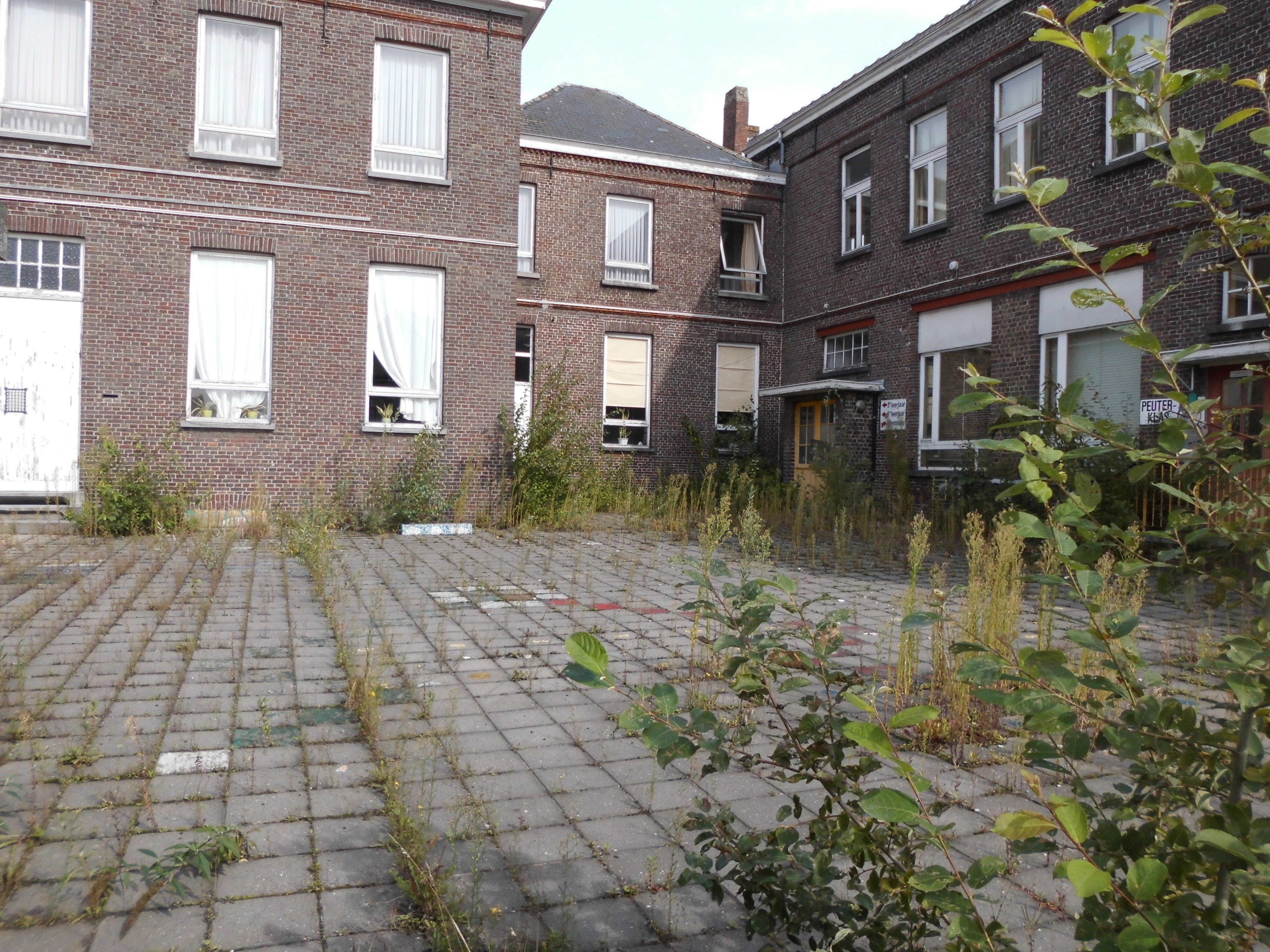 Voormalige Klooster, School en Rusthuis - Onderdale - Ursel - Knesselare - Oost-Vlaanderen - België